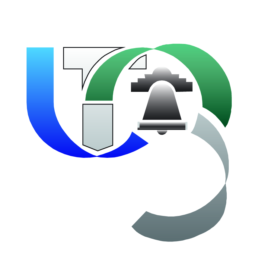 Universidad Tecnológica del Norte de Guanajuato (UTNG)